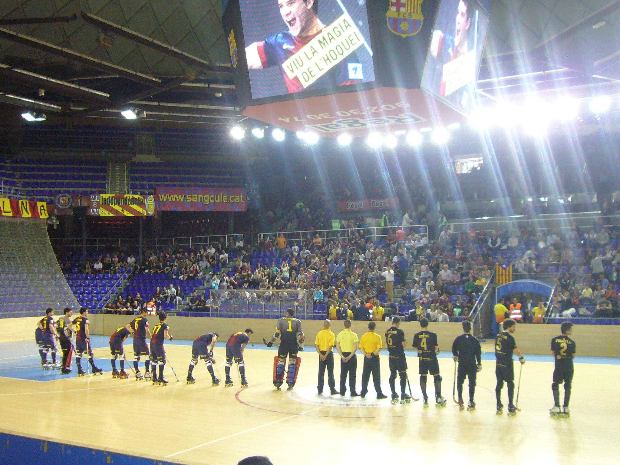 Hoquei patins - FC Barcelona 7 - 2 Sather Blanes, al Palau Blaugrana